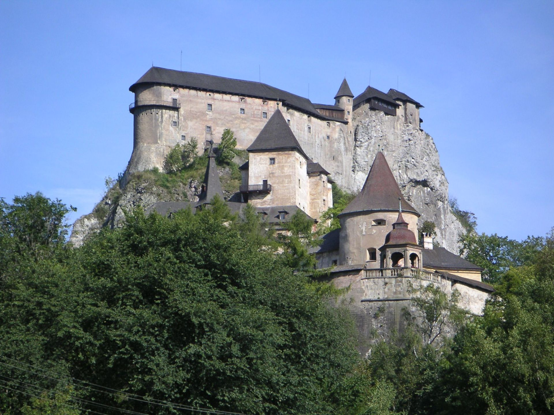 Zamek Orawski na Słowacji